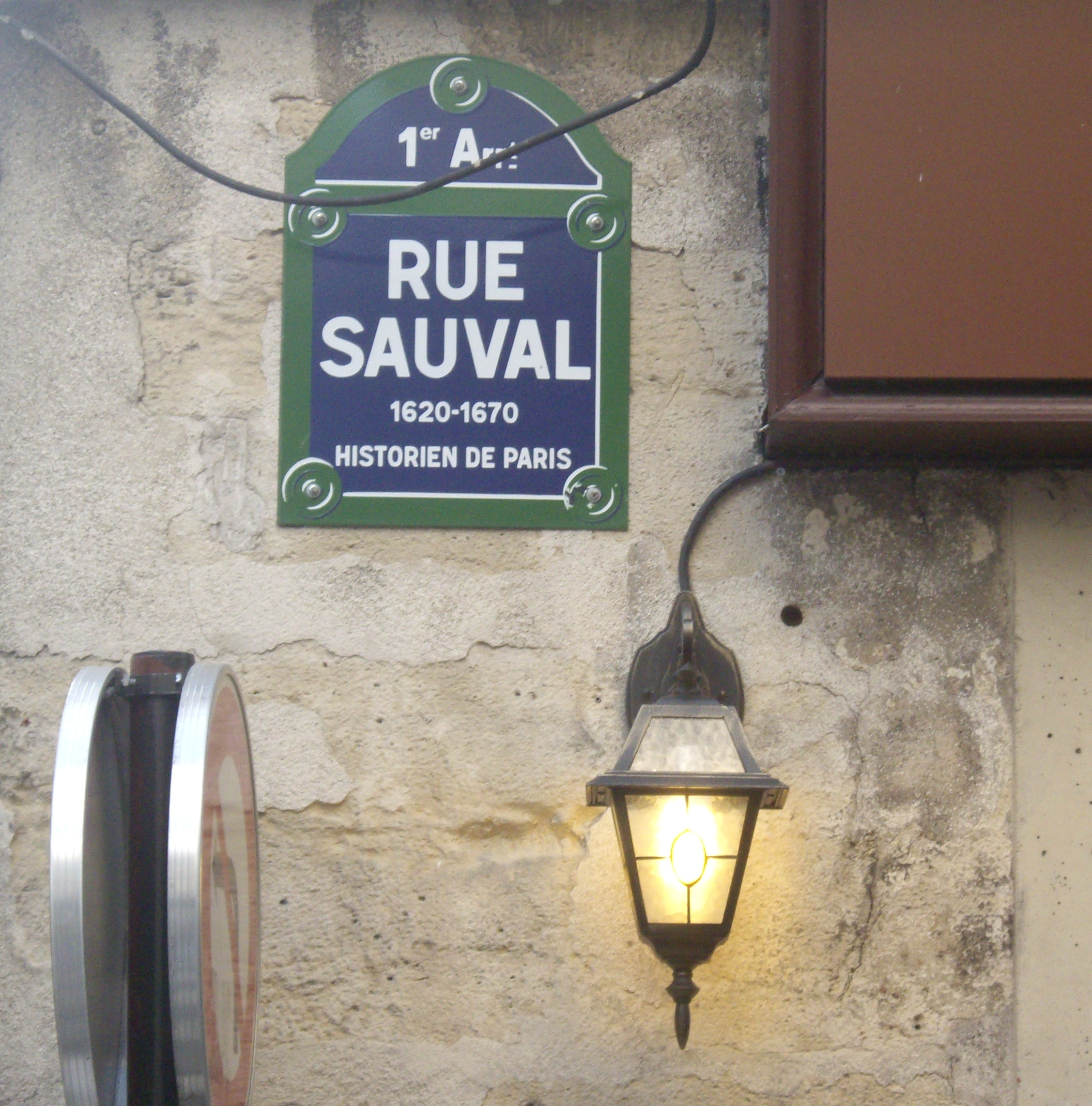 Rue Sauval, Paris, 1er, nommée en mémoire de l'historien parisien Henri Sauval (1623-1676) [dates corrigées].